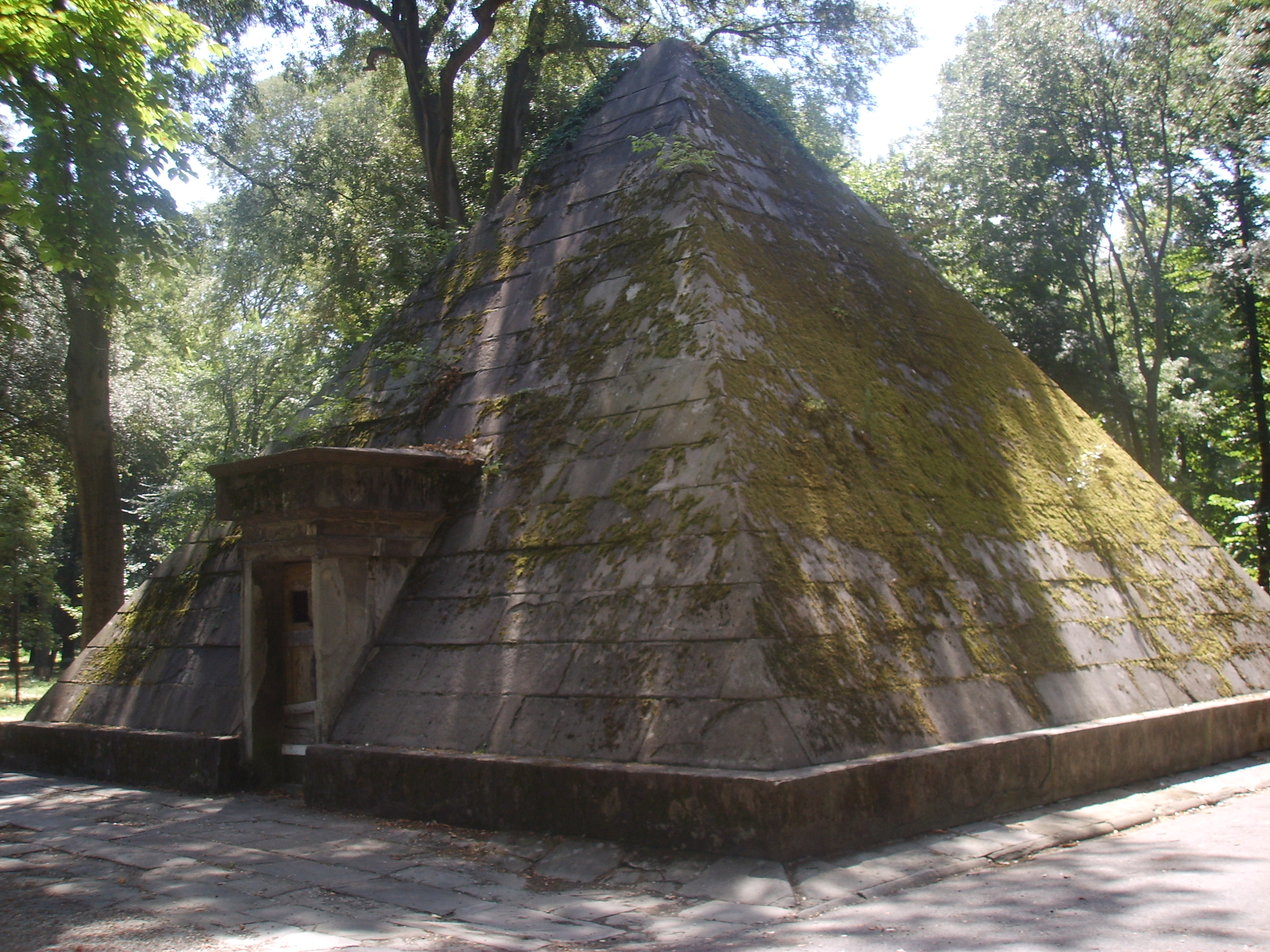 Parco delle cascine, Pyramid in Florence, Italy